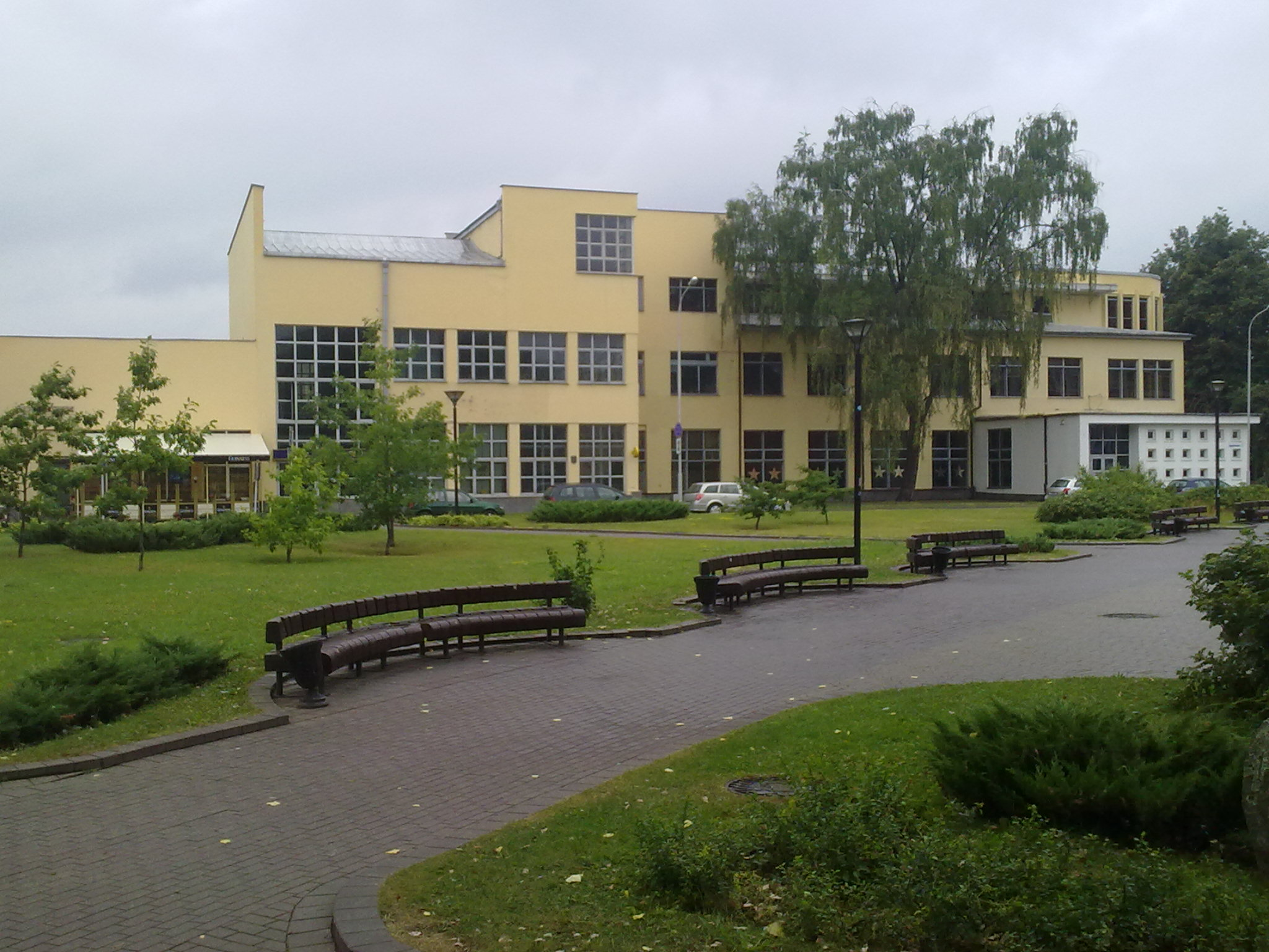 Мінск. Гістарычны цэнтр. 2012